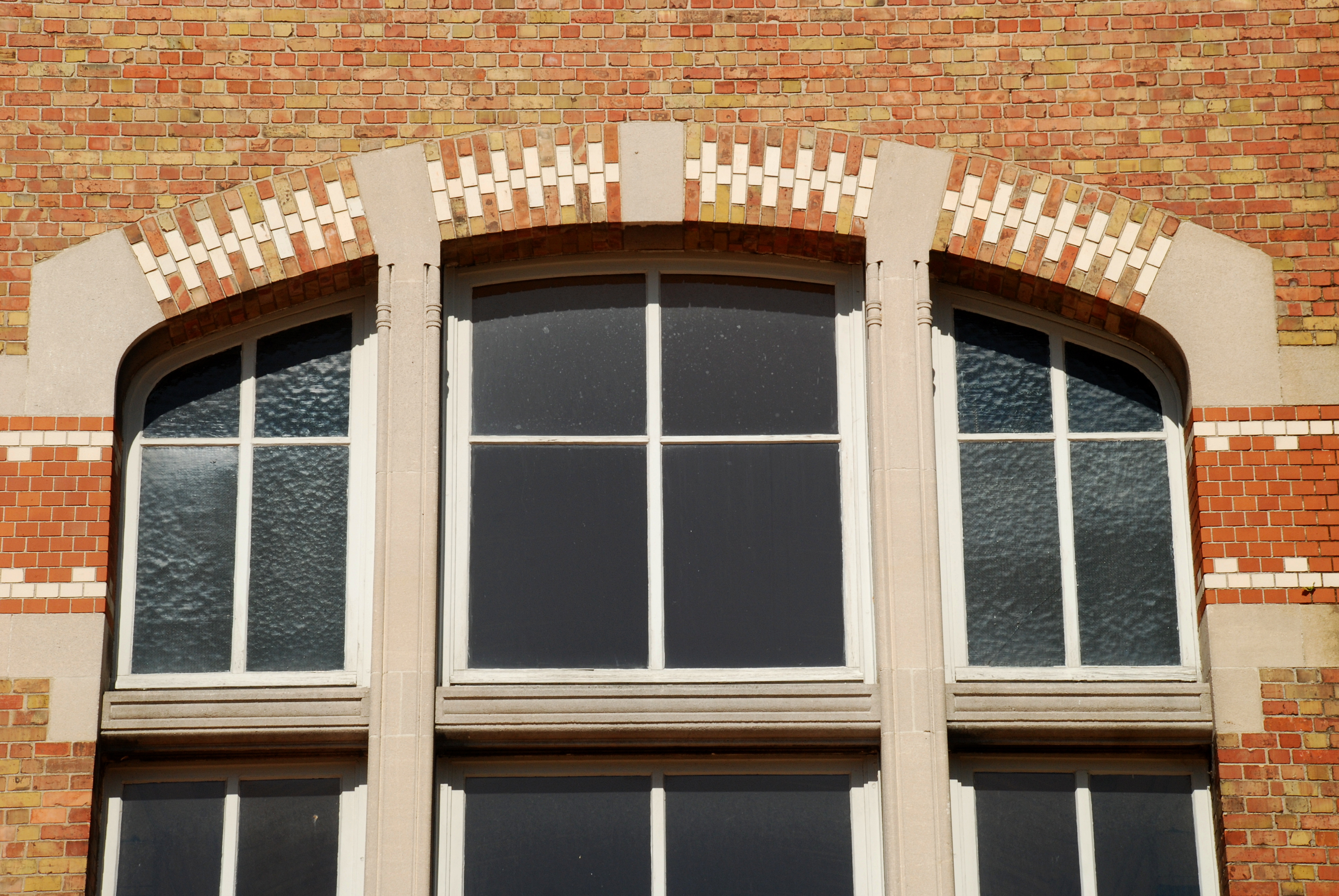 Belgique - Bruxelles - Centre scolaire du Souverain